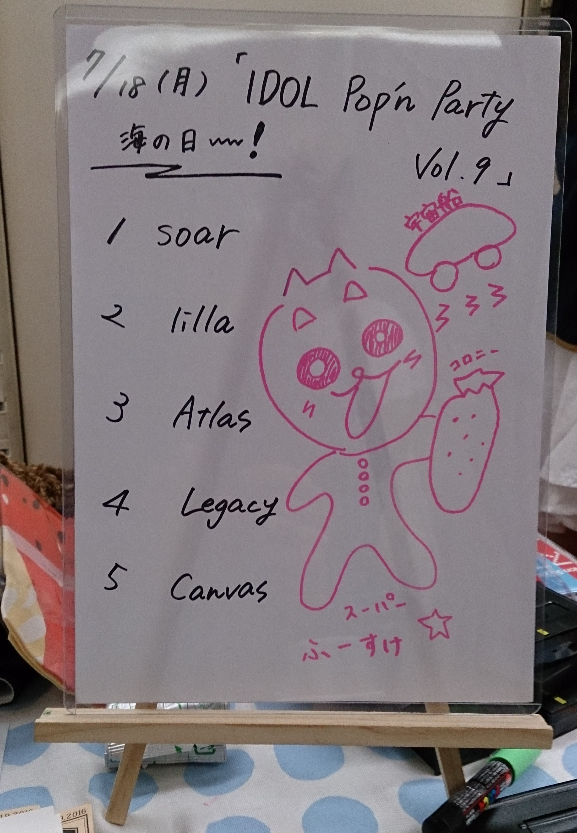 amiinAセトリボード(20160718(1))